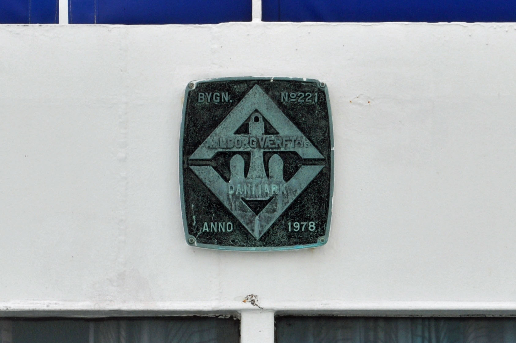 POVL ANKER (2012-07-15), by Klugschnacker in Wikipedia (7)